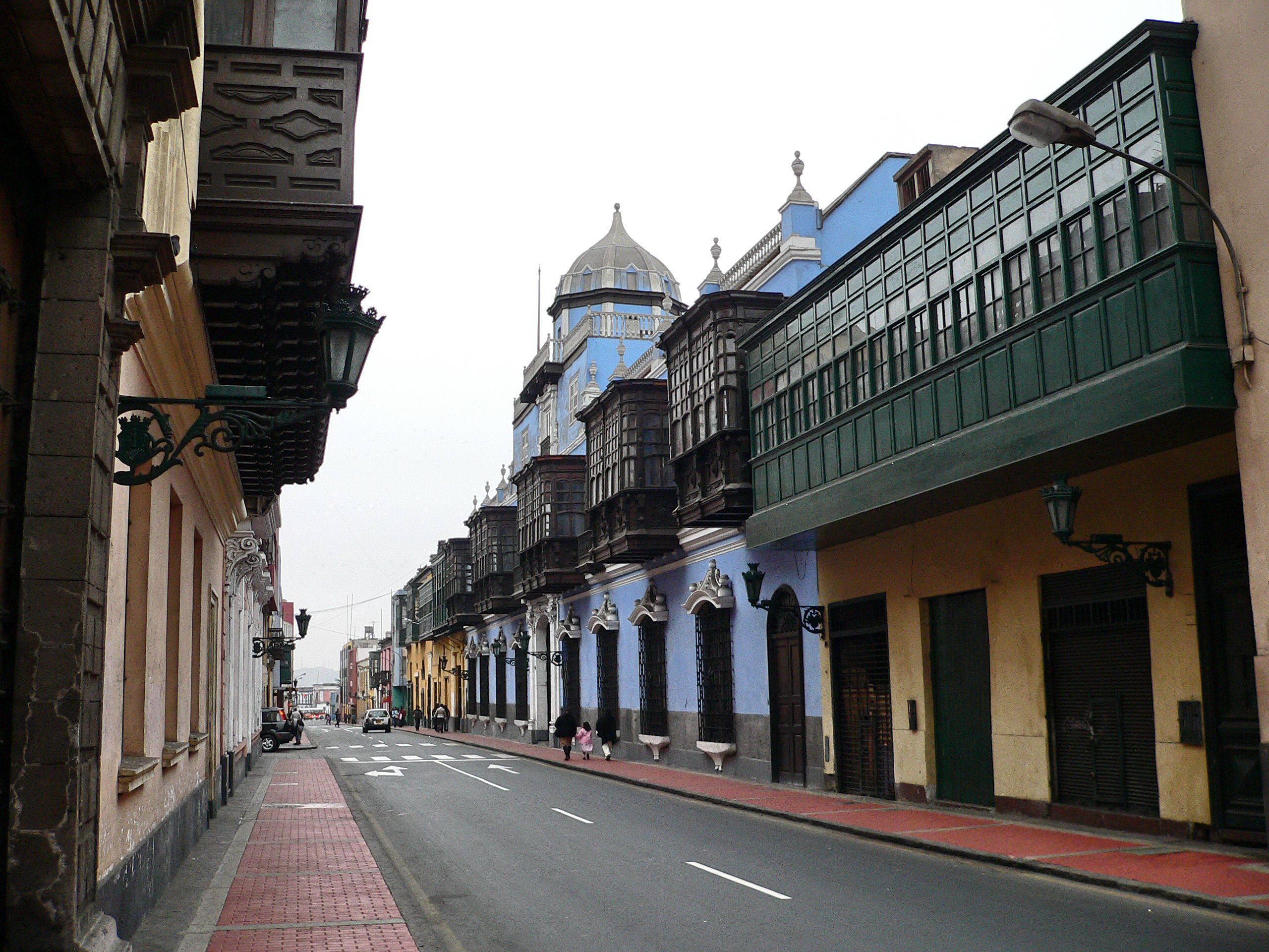 Descripción: Casa de Osambela y balcones vecinos Lugar: Centro Histórico de Lima Distrito : Cercado de Lima Ciudad : Lima País : Perú Fotógrafo: © Manuel González Olaechea y Franco Fecha de la foto : 8 de julio de 2007